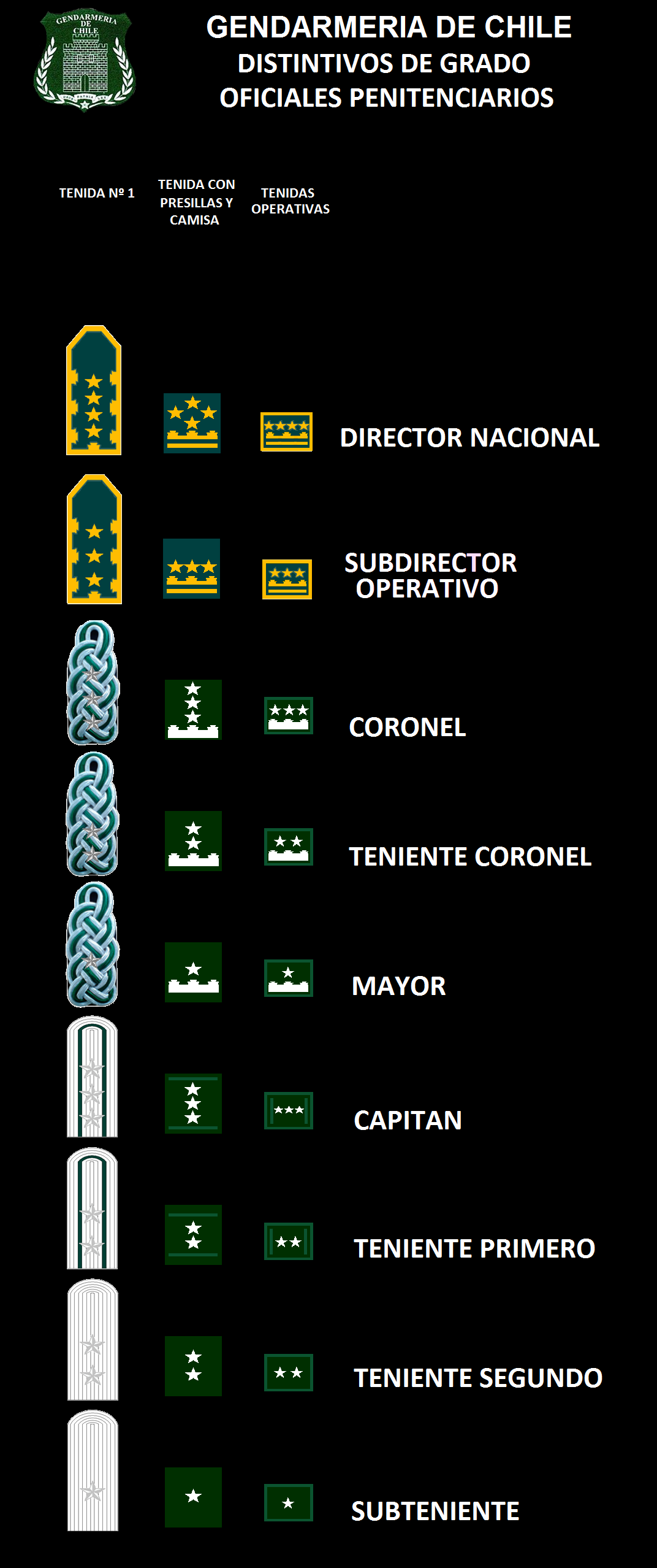 Escala de Grados de los Oficiales de Gendarmeria de Chile